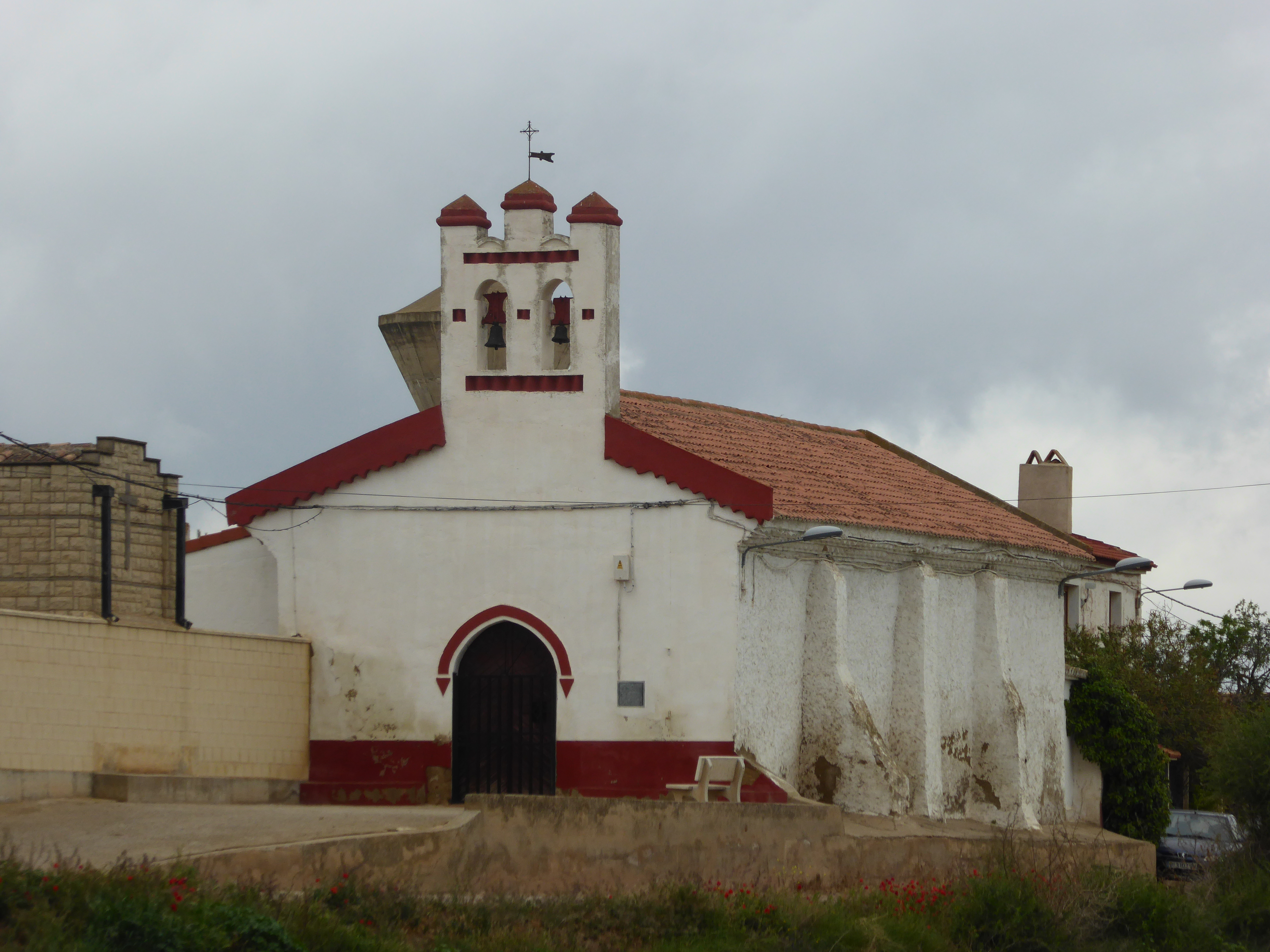 Grisén